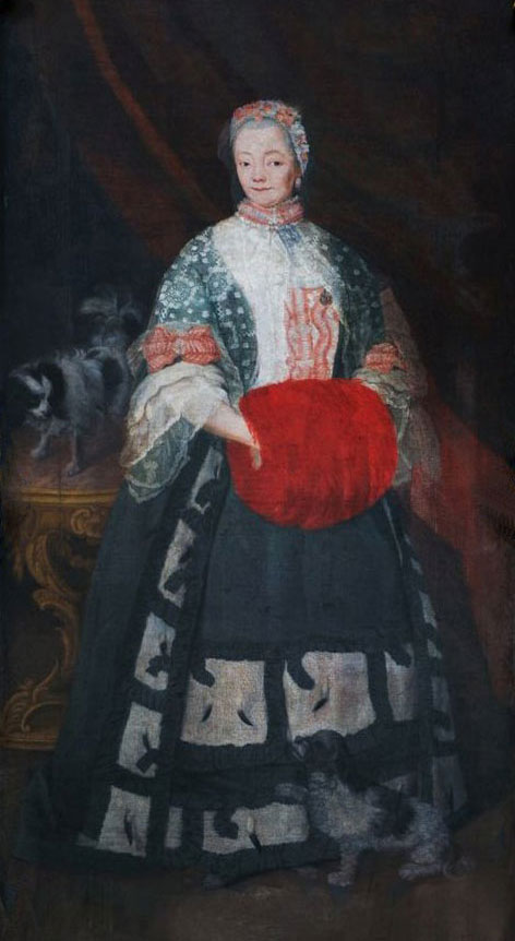 Беларуская (тарашкевіца): Партрэт Аўгусты Плятэр (Aŭgusta Plater) з Агінскіх (Aginski)